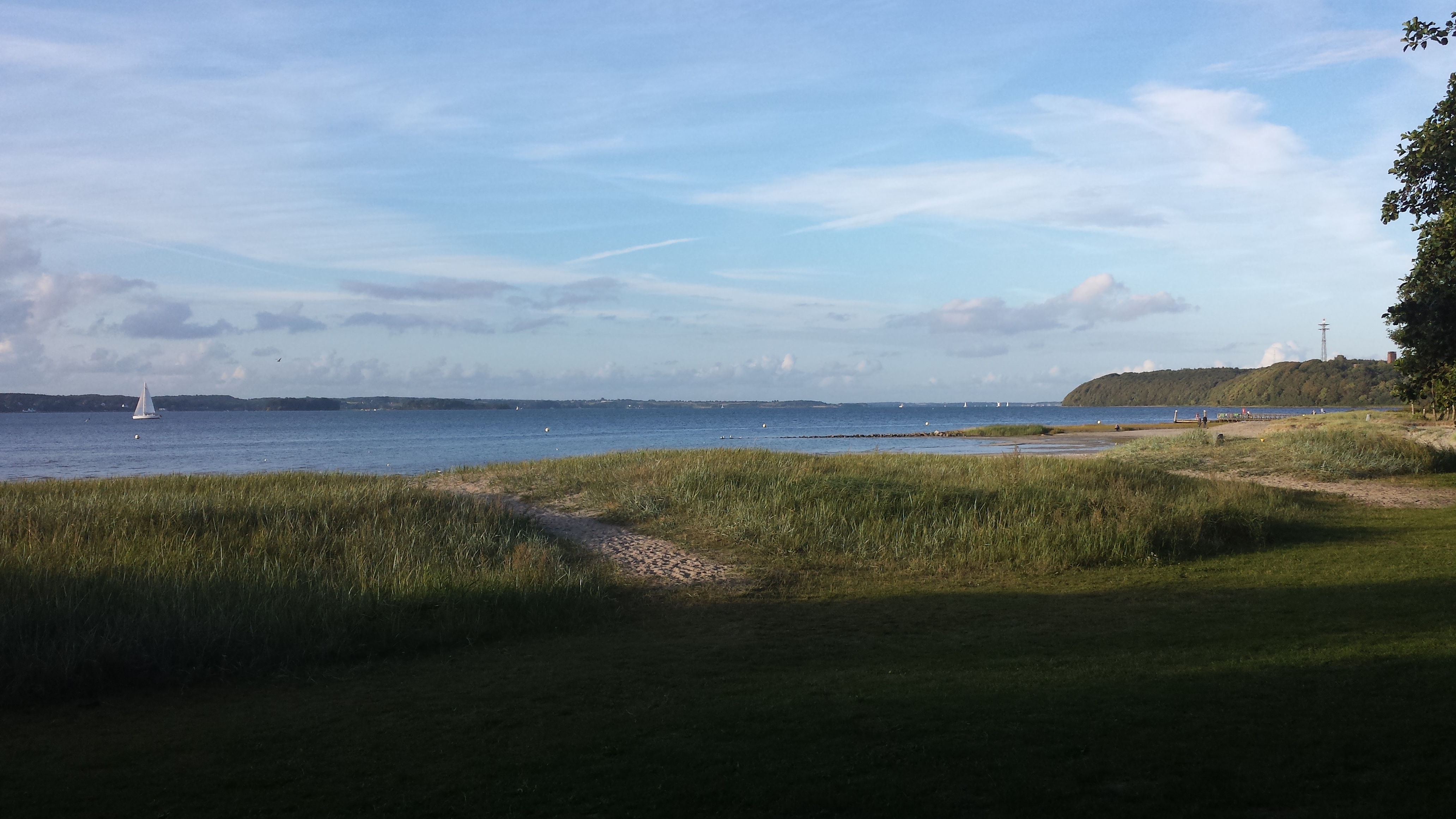 Solitüde im Sommer 2014